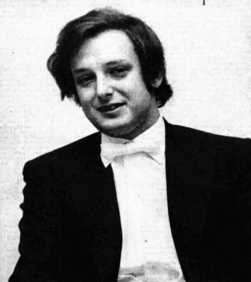 Italian pianist Dino Ciani